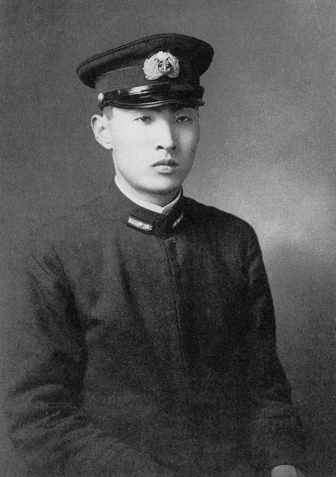 昭和18年（1943年）、海軍航空技術廠時代の、百瀬晋六海軍技術中尉